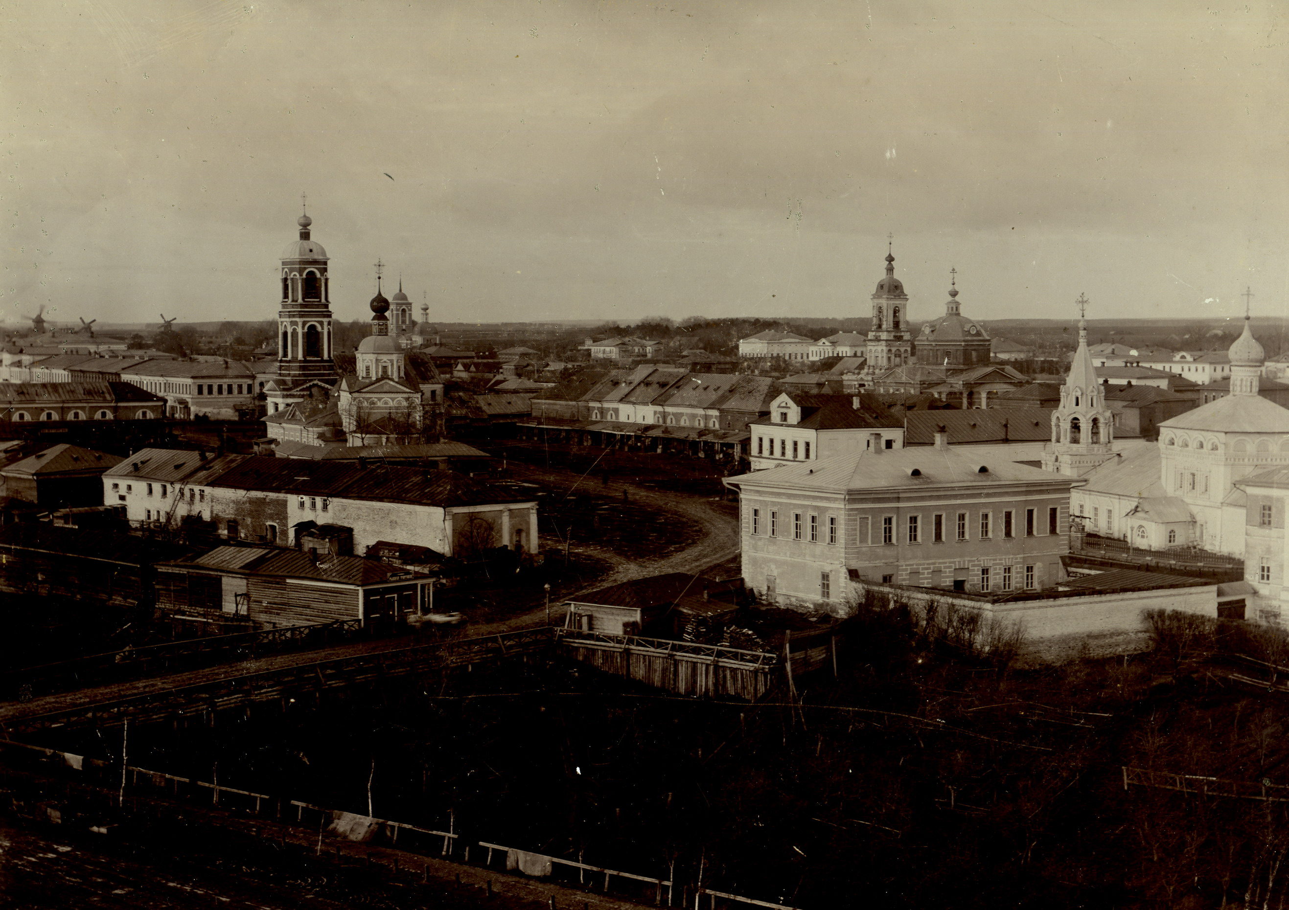 Муром. Вид на торговые ряды и церковь Рождества Христова с колокольни Рождественского собора. 1901. Место хранения: Муромский музей